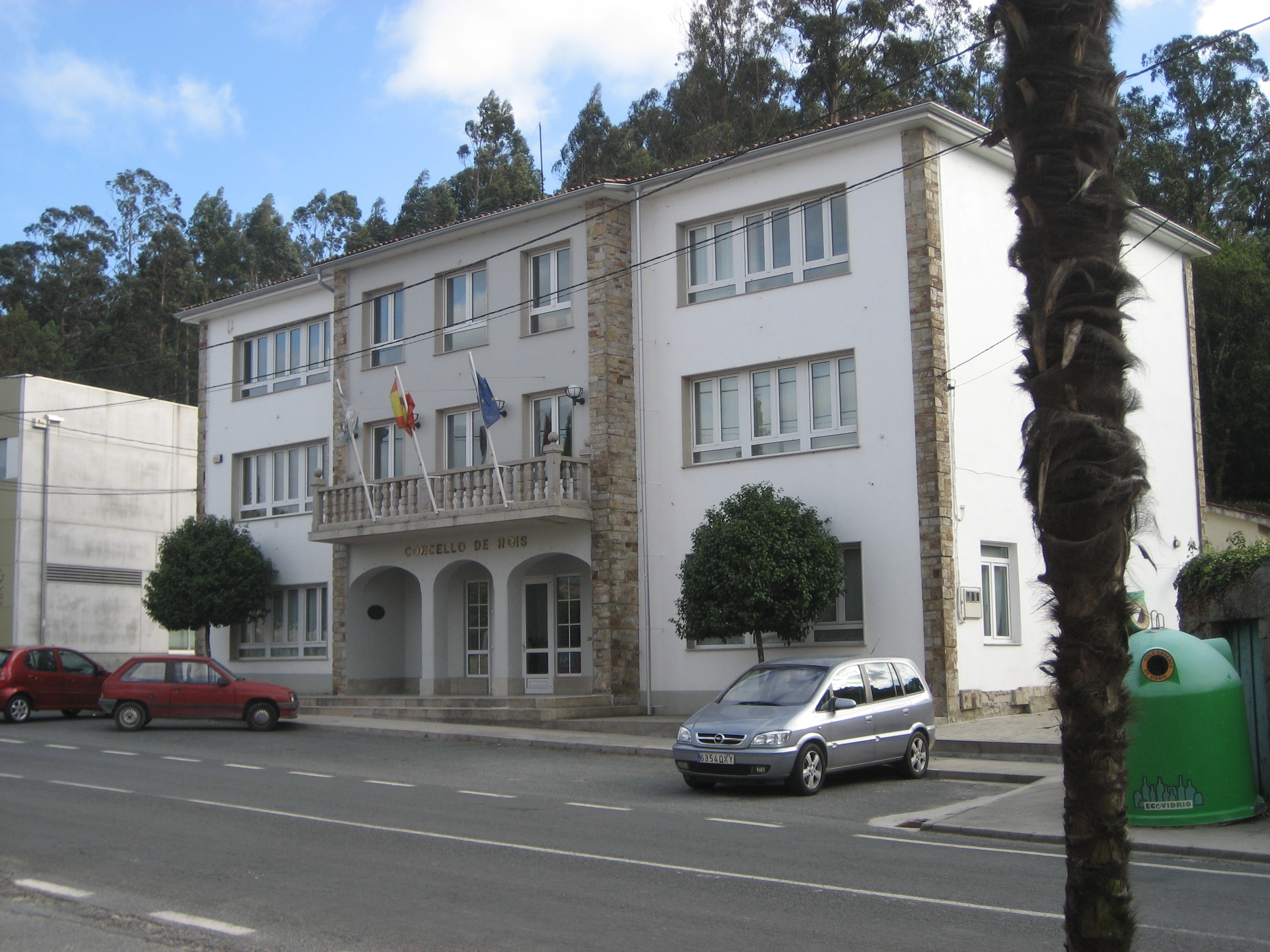 Concello de Rois. En Samil, Oín, Rois (A Coruña).